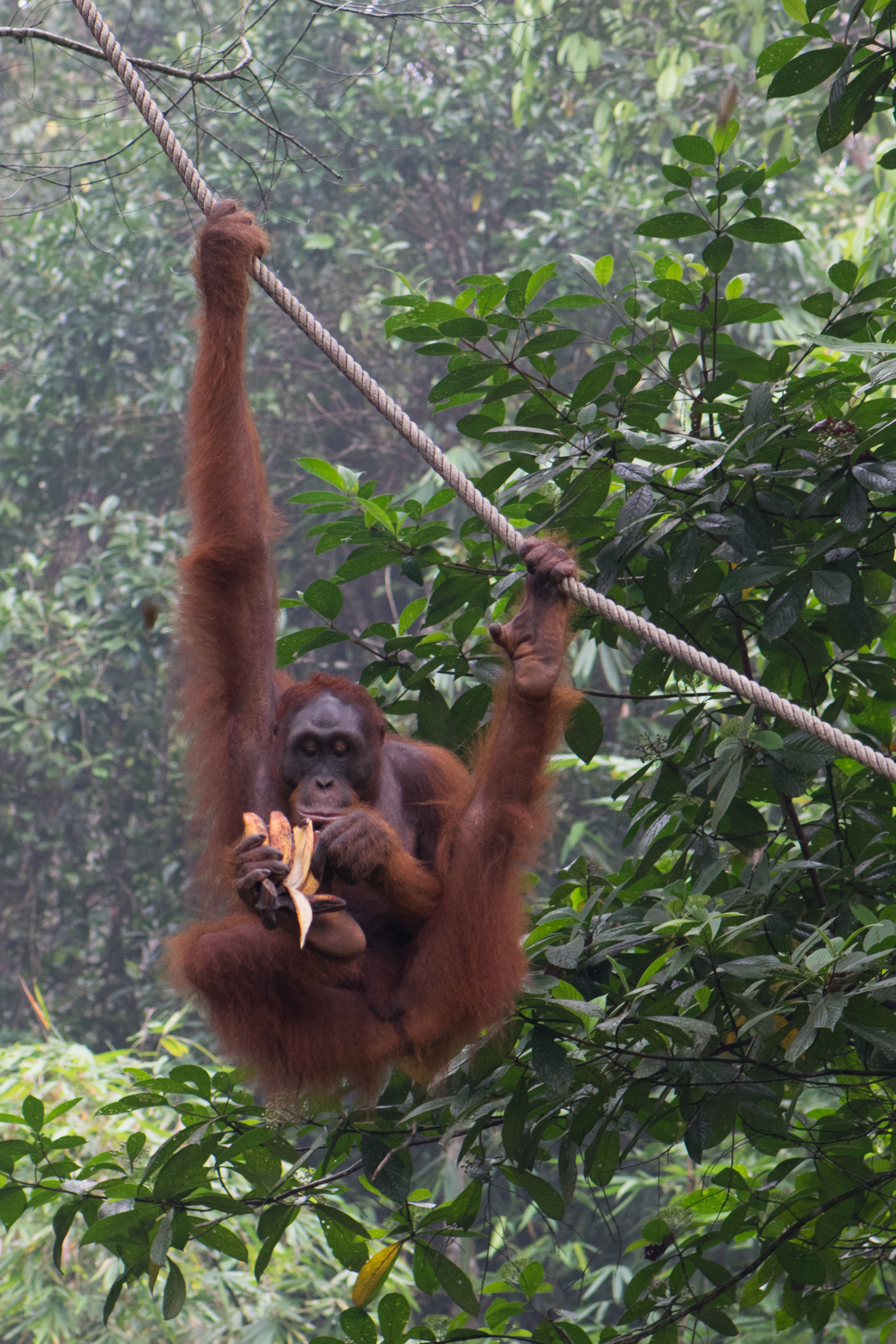 Semenggoh Nature Reserve, Sarawak, Borneo, Malaysia 2015